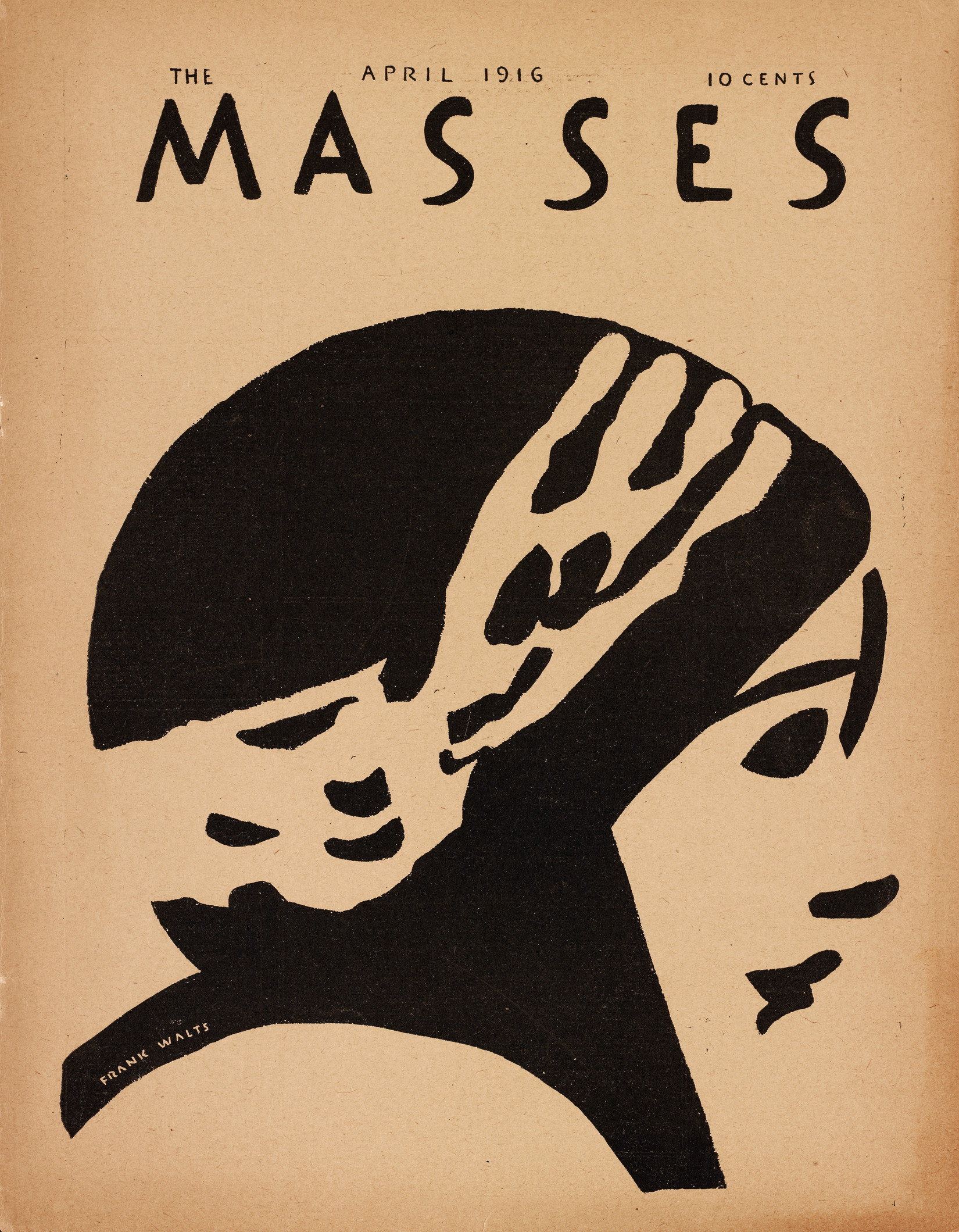 Portada del número de abril de 1916 de The Masses.